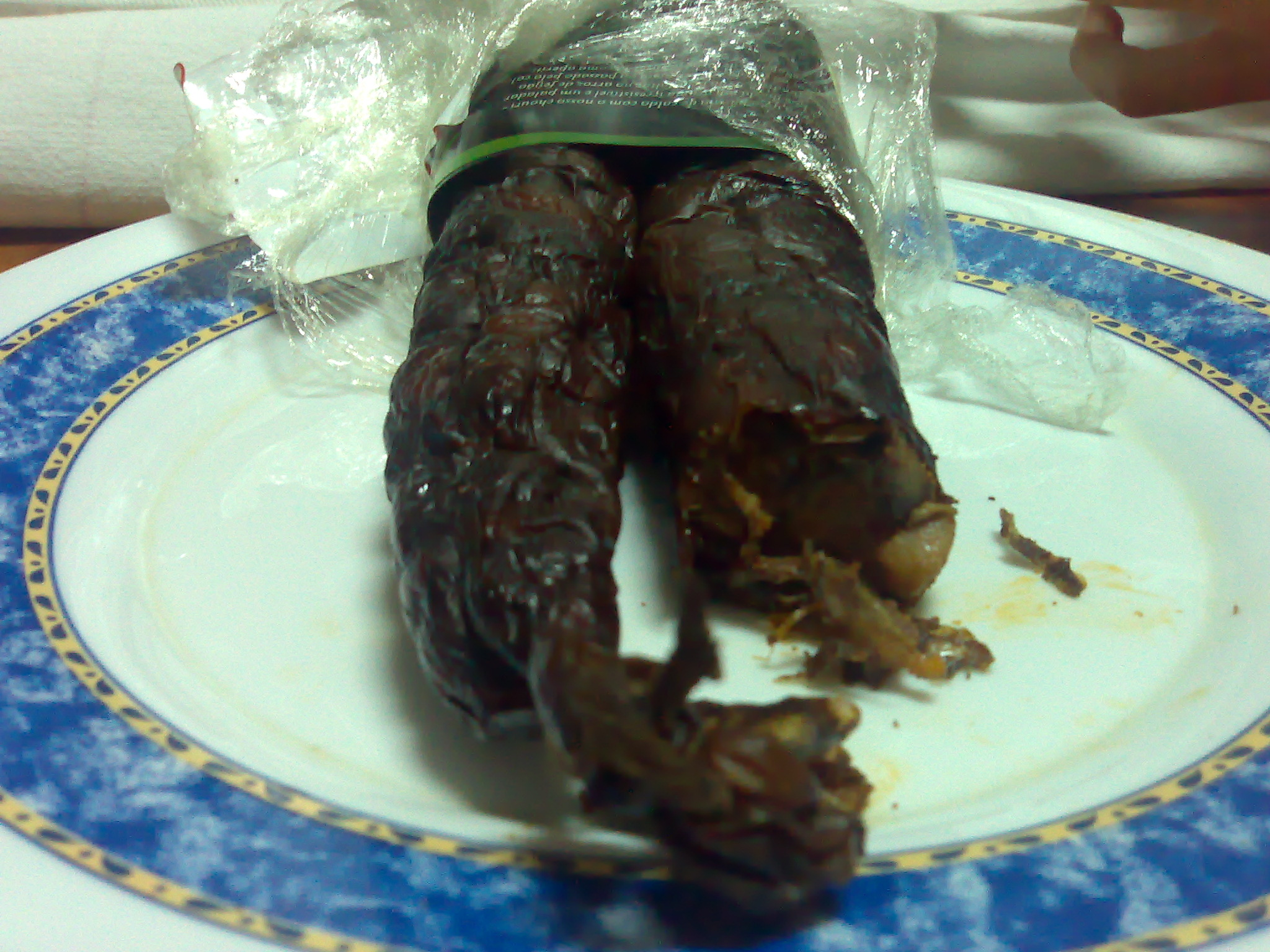 Chouriço de cebola de Ponte de Lima. Portuguese sausagem with onions from Ponte de Lima.